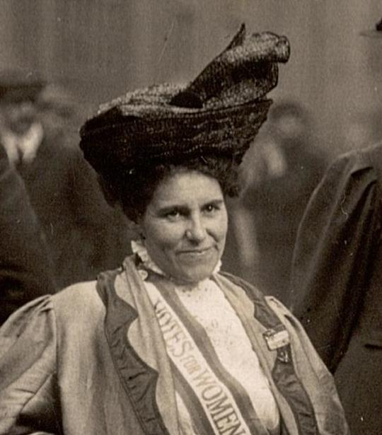 twl 2002 22